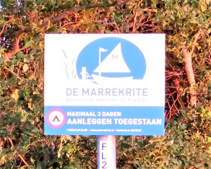 Vignet van De Marrekrite, een samenwerkingsorgaan van de Provincie Friesland en 19 Friese gemeenten, met als doel het Friese waterland recreatief/toeristisch zo goed mogelijk te laten functioneren.